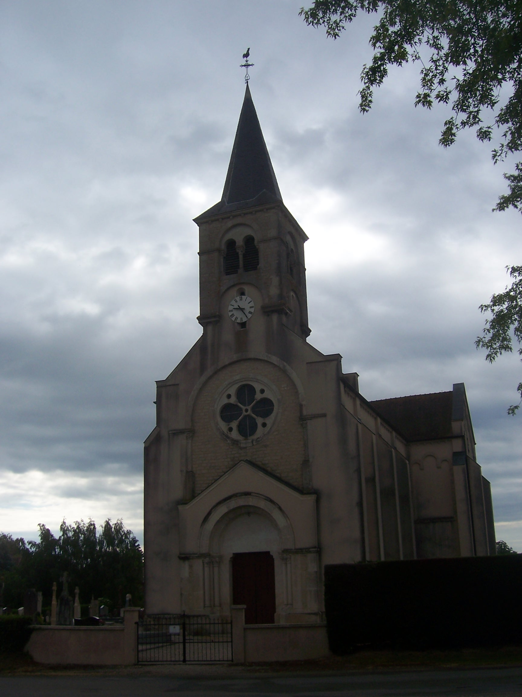 Eglise de Devrouze